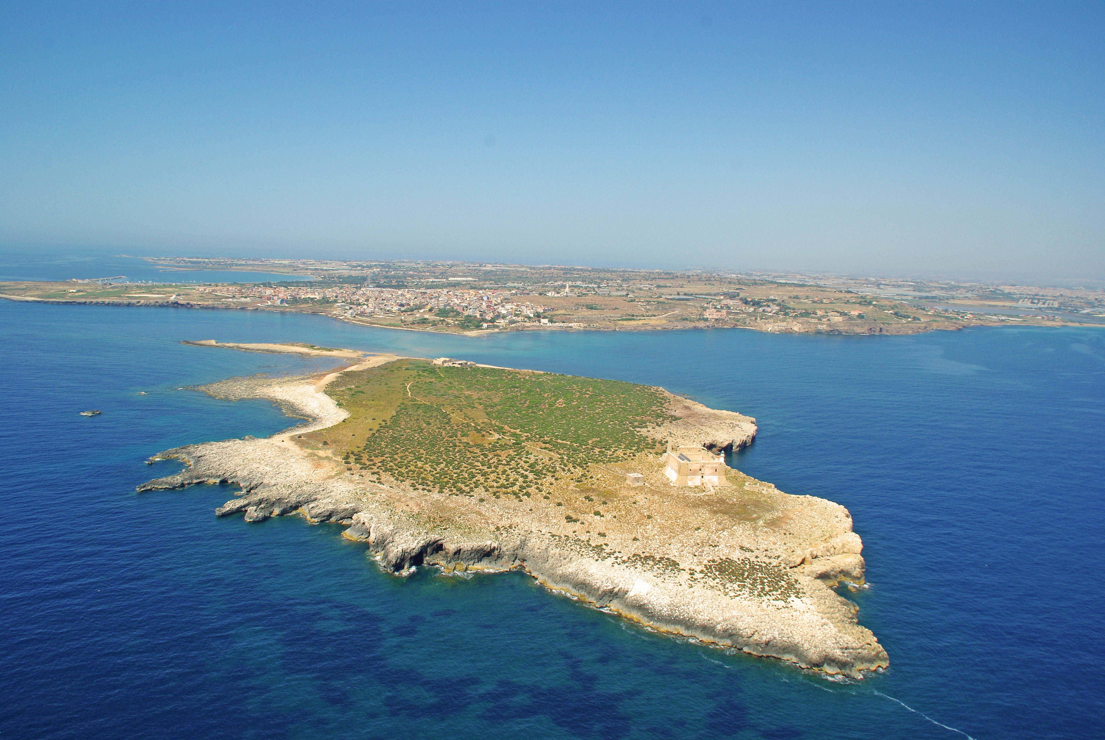 Portopalo isola di Capopassero